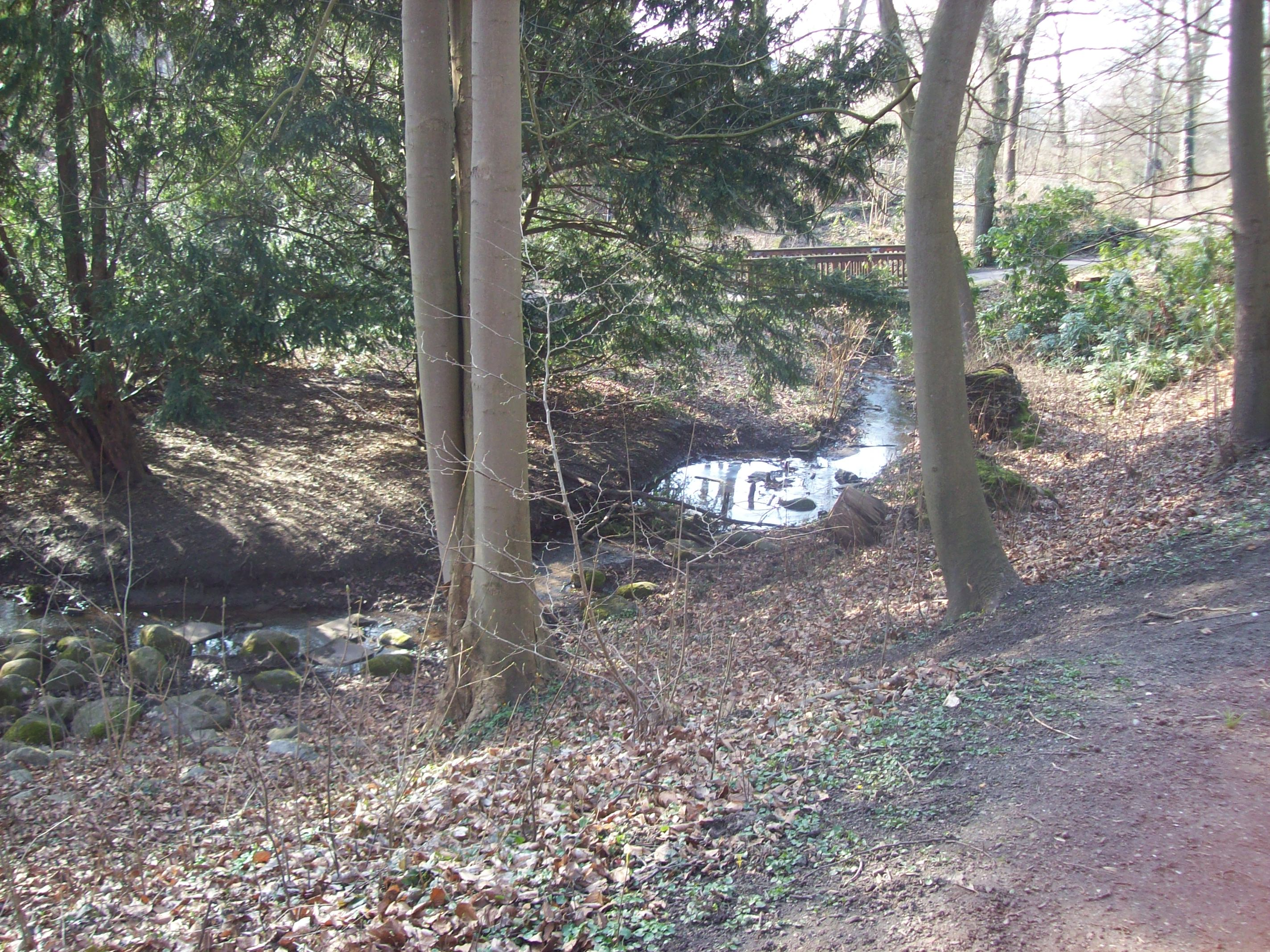 Der Wesselöftpark befindet sich im Hamburger Stadtteil Nienstedten an der Christian F.-Hansen-Straße und der Straße Quellental. Der Park wurde von der Kaufmannsfamilie Wesselhöft der Stadt Hamburg übergeben und ist seit 1953 öffentlich. In dem kleinem Park staut sich die " Kleine Flottbek " zwei Mal zu einem Teich und verläuft dann südlich in die Elbe.